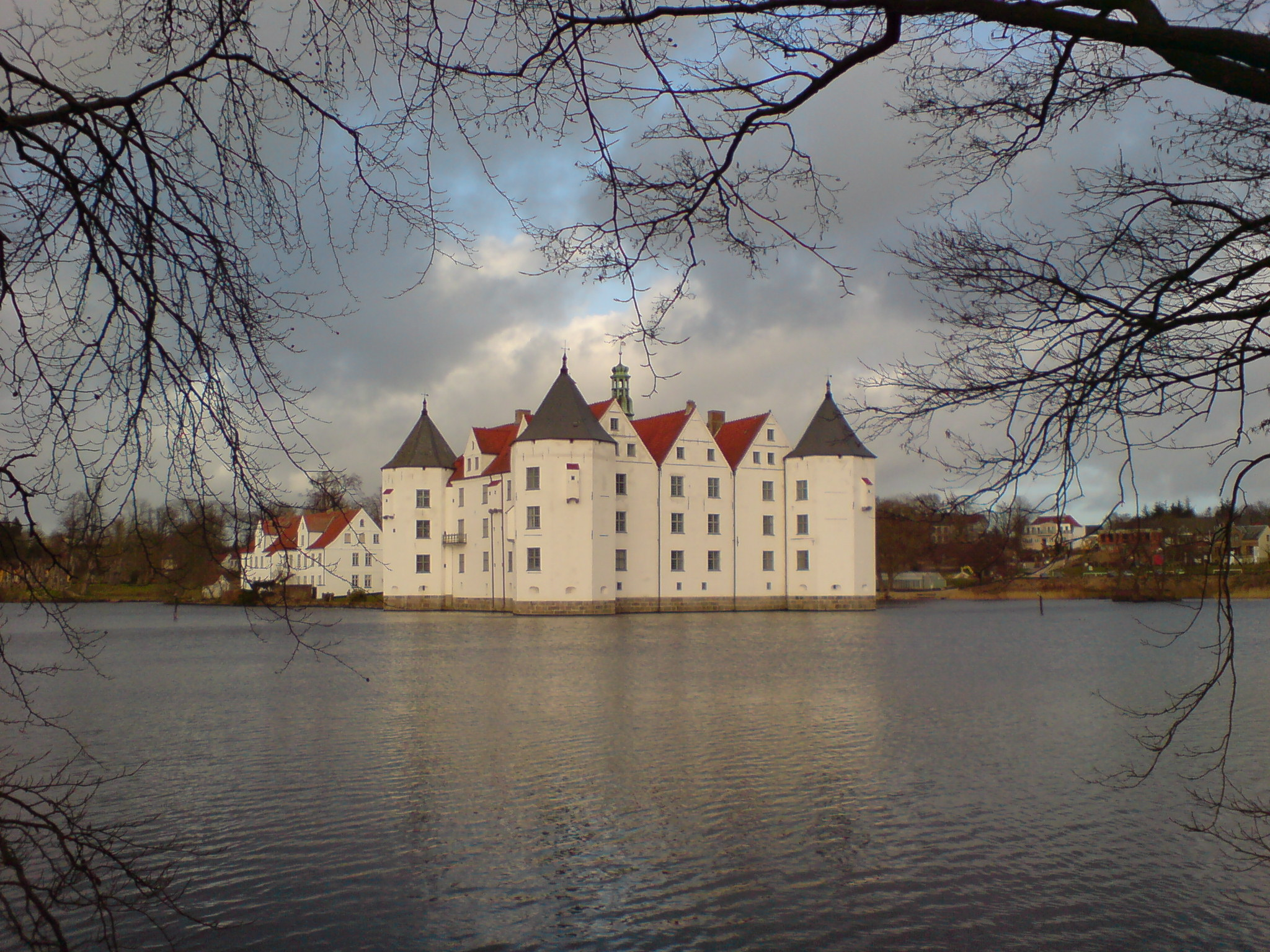 Schloss Glücksburg, Frühjahr 2008 PodracerHH 21:40, 6 March 2008 (UTC)